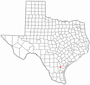 Volapük: Topam in tat: Texas.